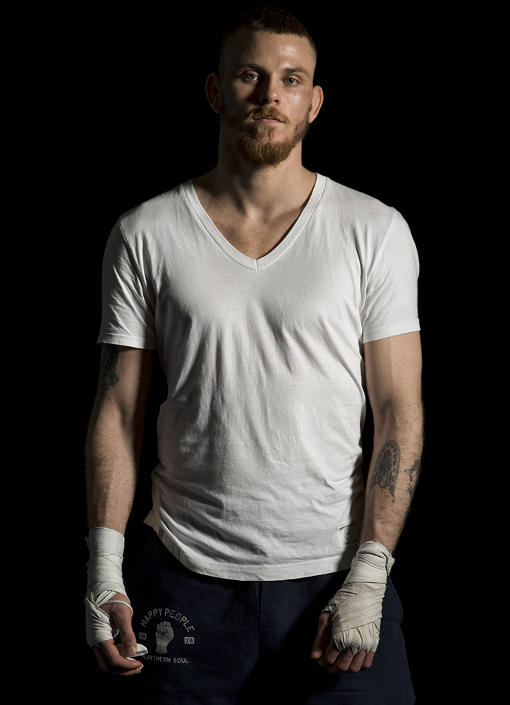 Niklas Bäckström i träningslokalerna på Allstar Training Center i Stockholm